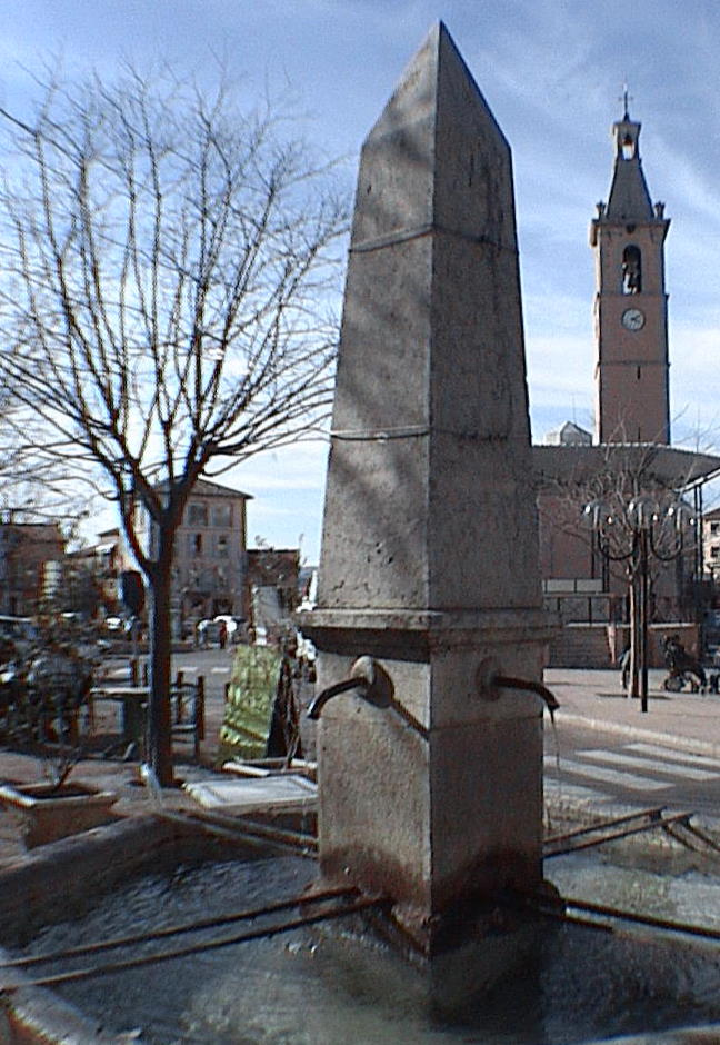 Fontaine d'Oraison (Alpes-de-Haute-Provence)